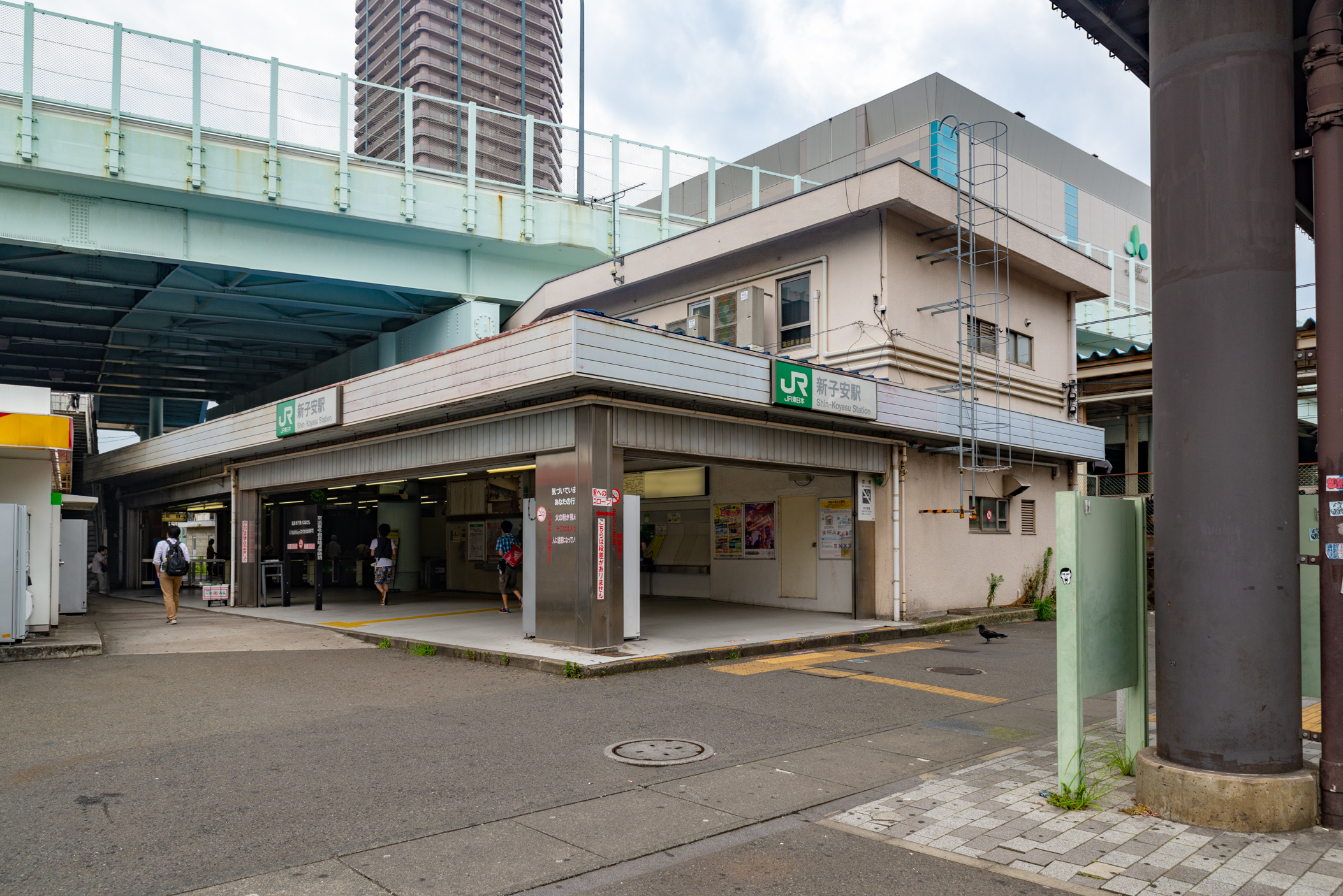 東日本旅客鉄道株式会社東海道本線（京浜東北線）新子安駅駅舎